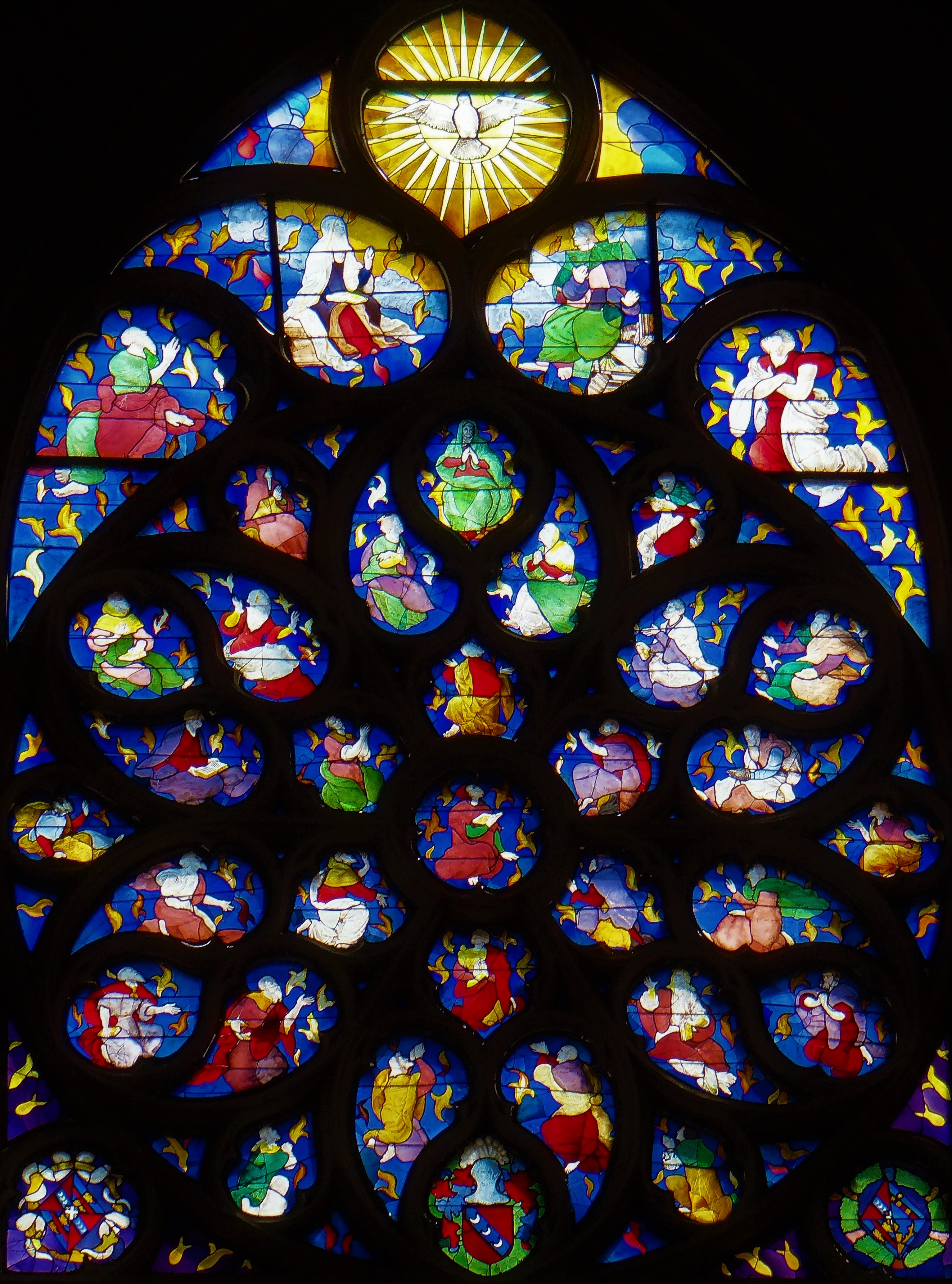 Paris - Église Saint-Germain-l'Auxerrois - Transept : Rose sud de la Pentecôte (baie 118)